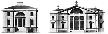 Образцовое здание из альбома